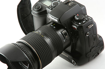 Kodak SLR/C Digital SLR By ExNihilo Portfolio